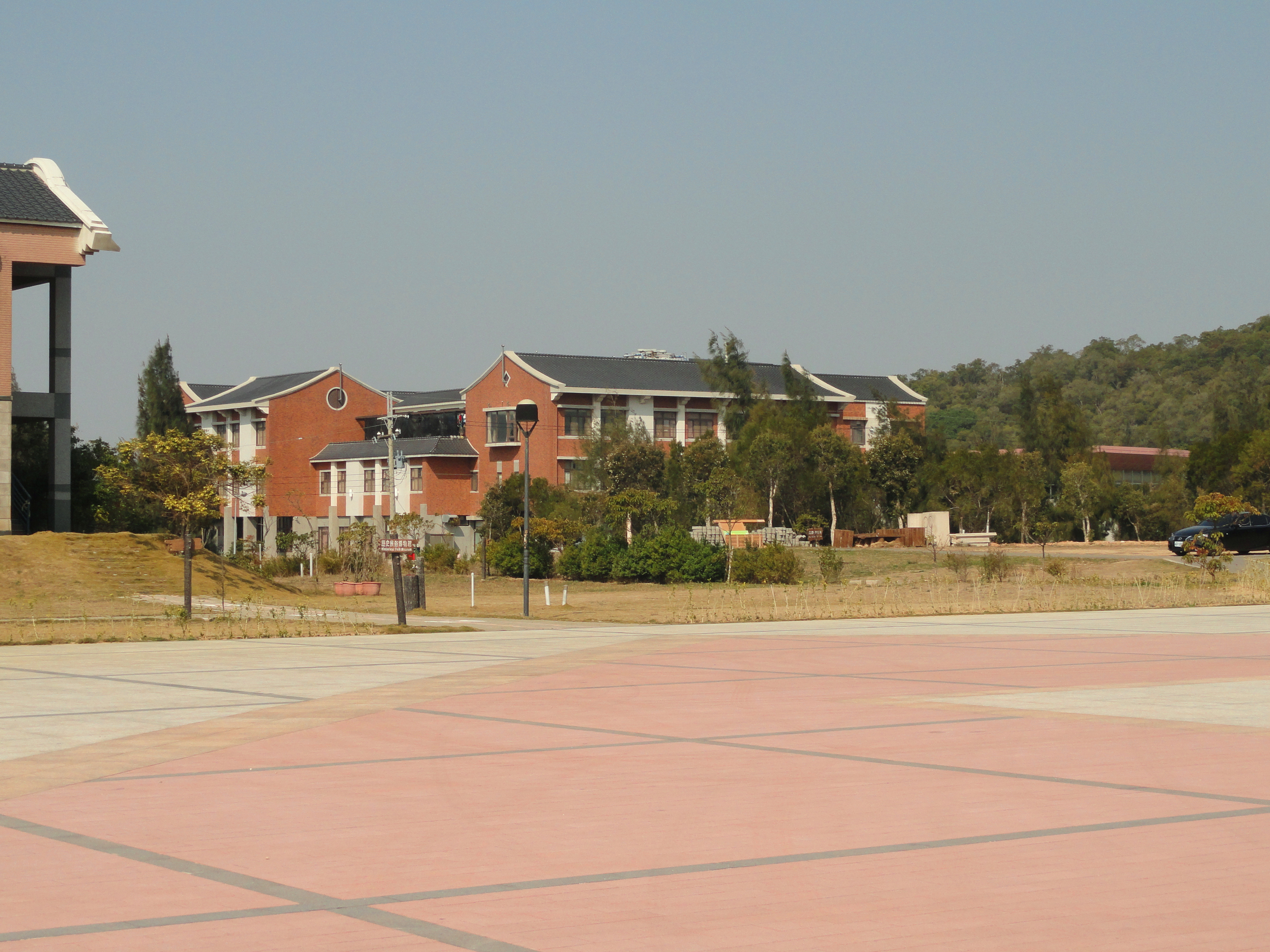 铭传大学金门校区